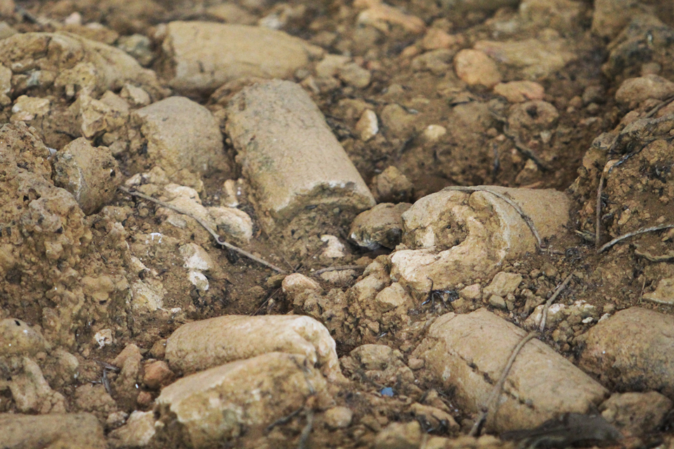 Lambakan tuyere yang digunakan untuk proses peleburan besi